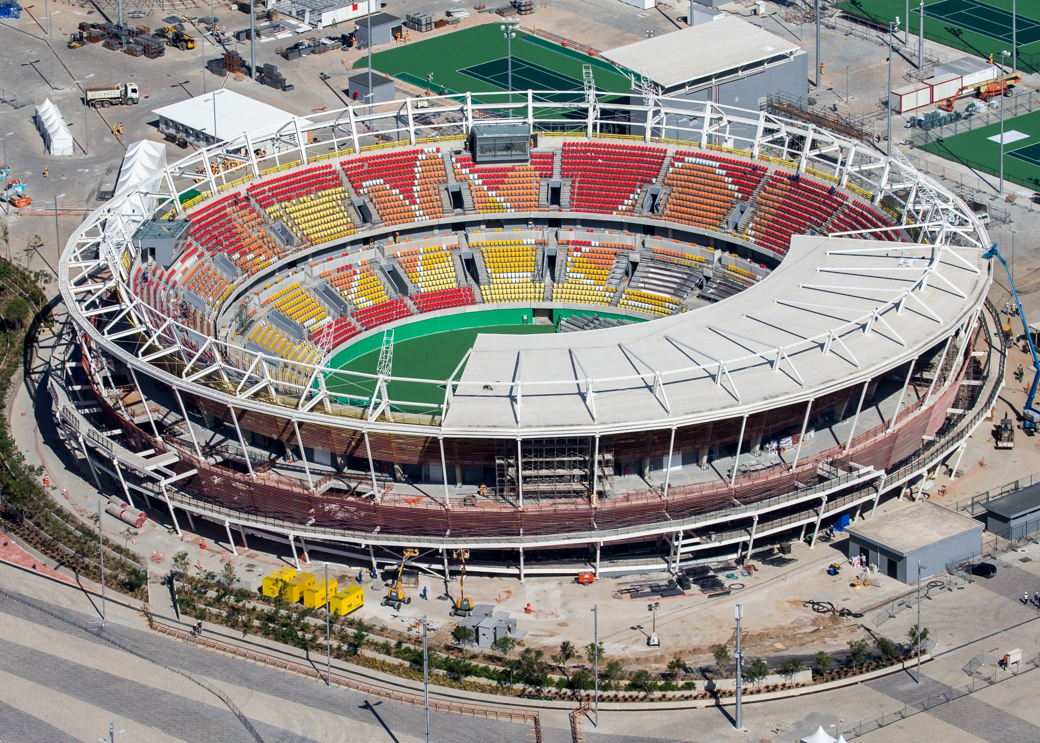 Centro Olímpico de Tênis dos Jogos Olímpicos de 2016